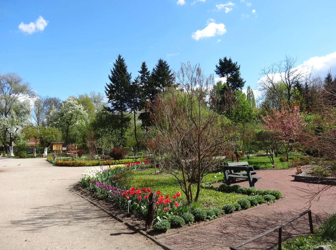 Arboretum Uniwersytetu Kazimierza Wielkiego w Bydgoszczy